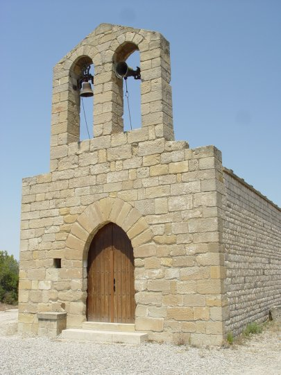 Ermita de Berrús de Riba-roja d'Ebre